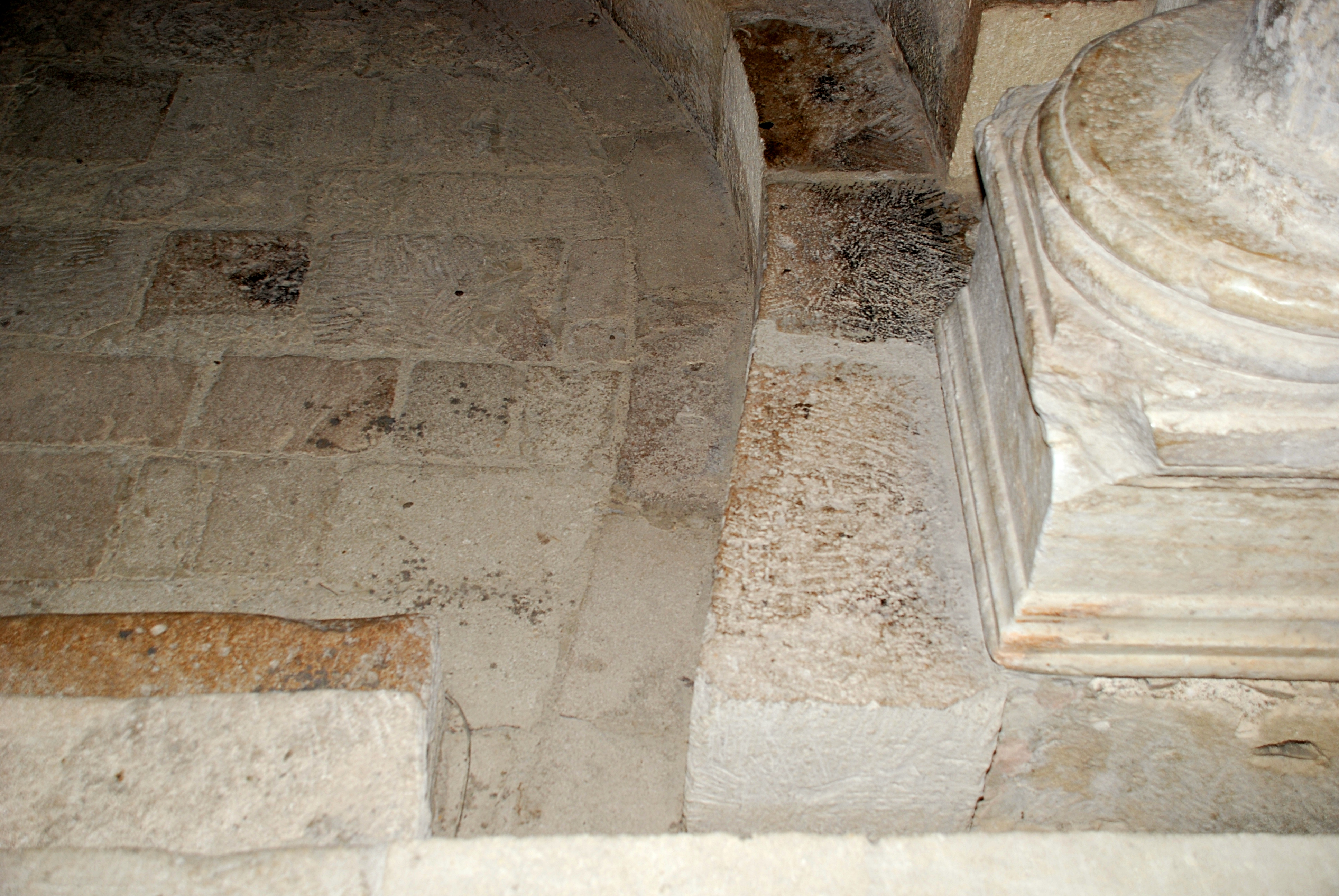 Cathédrale de Vaison la Romaine- Abside de plan outrepassé (détail)